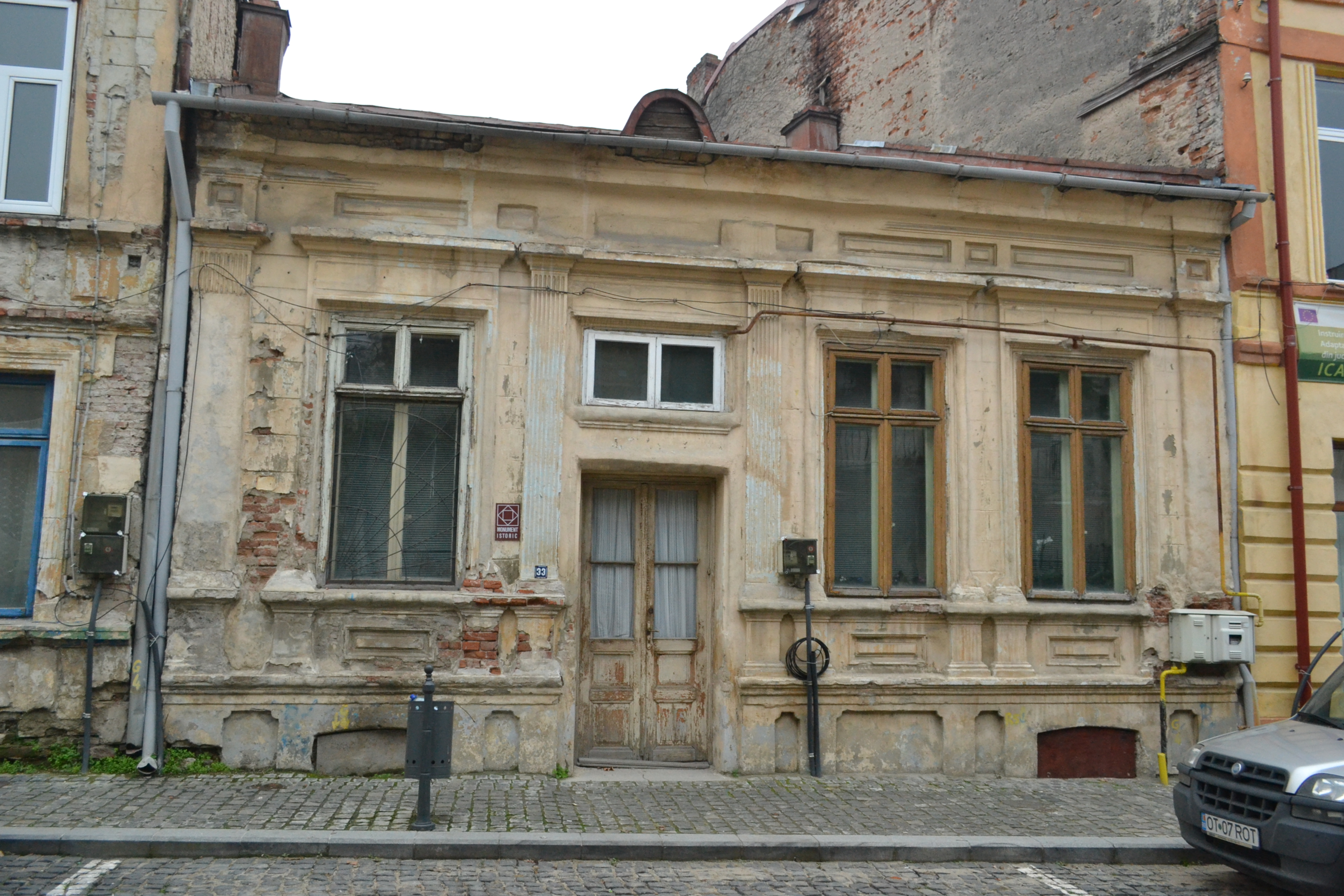 Casa Stavri din Slatina în 2014